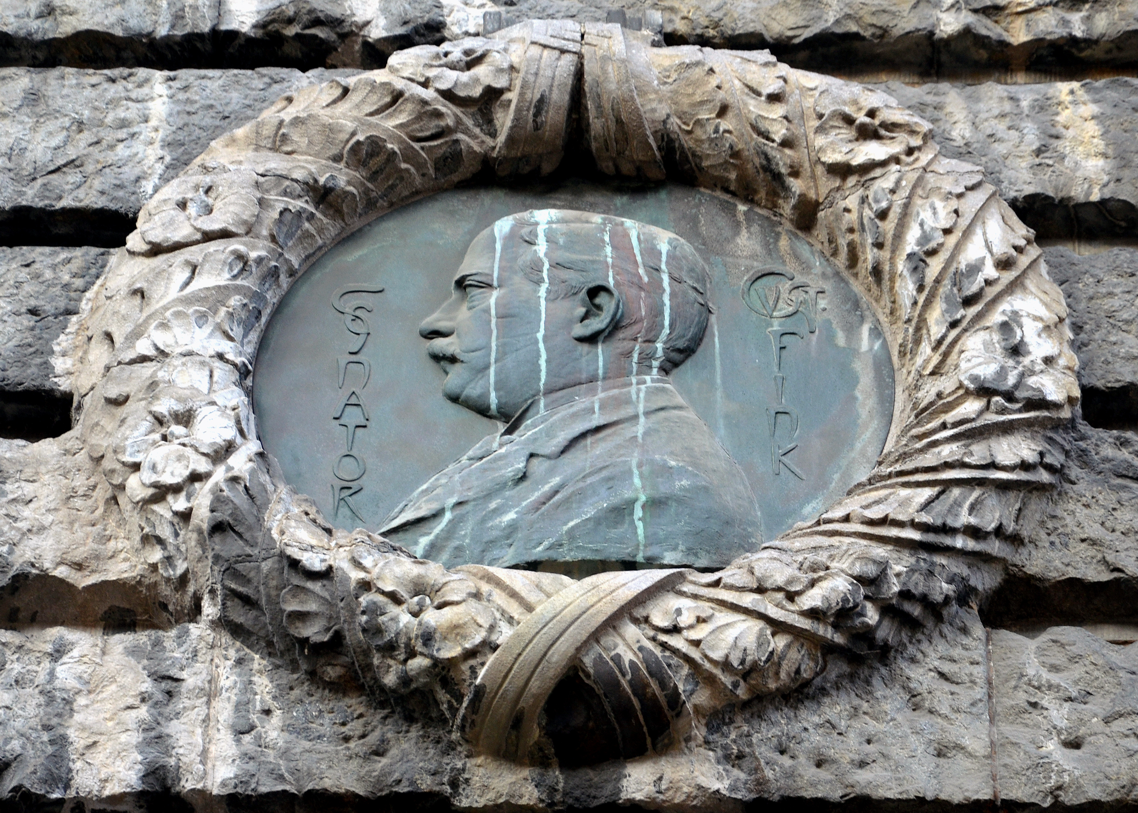 Porträt-Medaillon des Bildhauers Karl Gundelach mit dem Bildnis des Senators (und späteren Bürgermeisters von Hannover) Gustav Fink, Vorstand während des 1900 bis 1901 von dem Architekten Albrecht Haupt errichteten Neubaus des Wohn- und Geschäftsgebäudes der Langeschen Stiftung in der Theaterstraße 14 ...